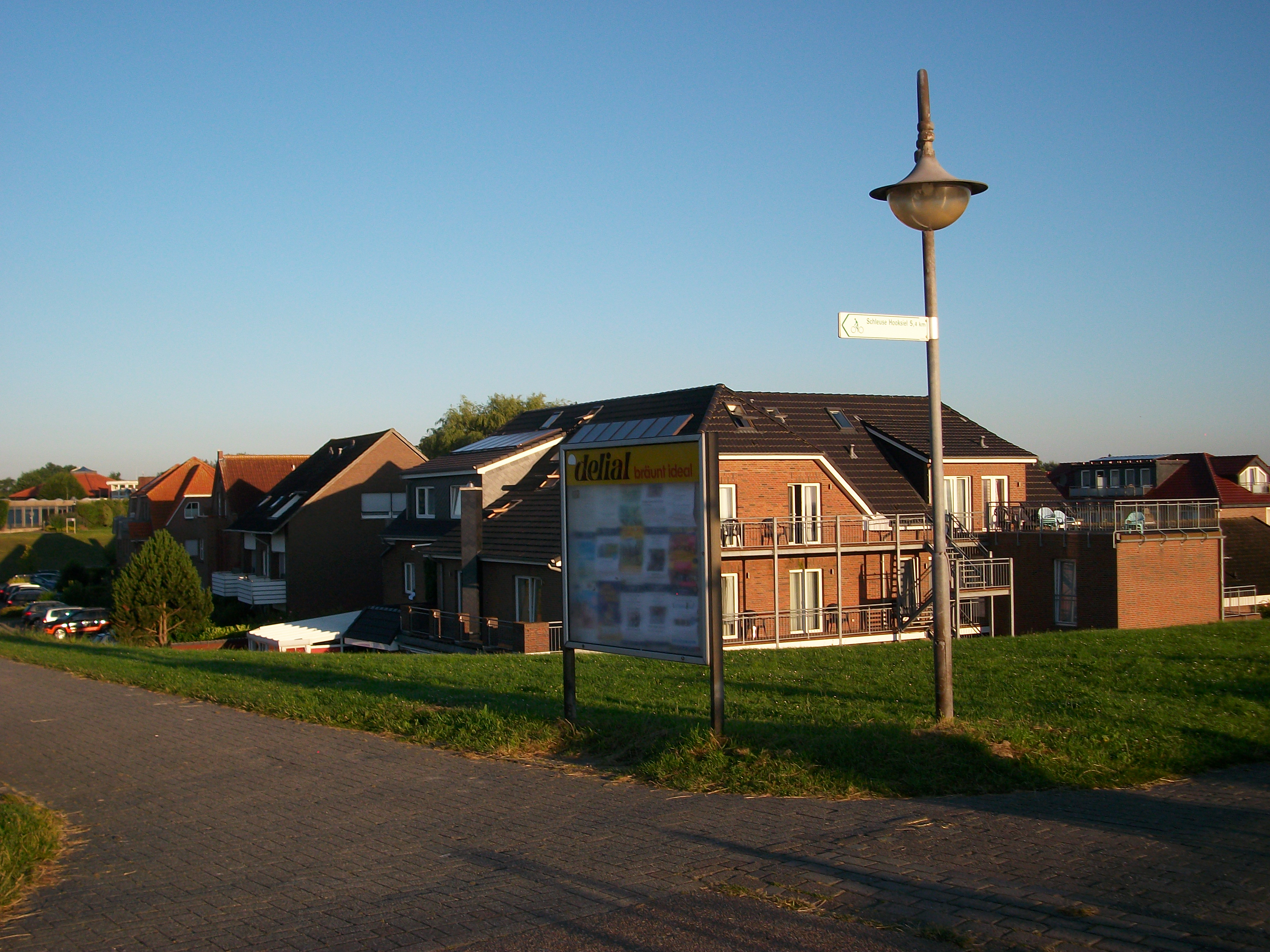 Zgrade sa tipičnom arhitekturom u Horumersielu